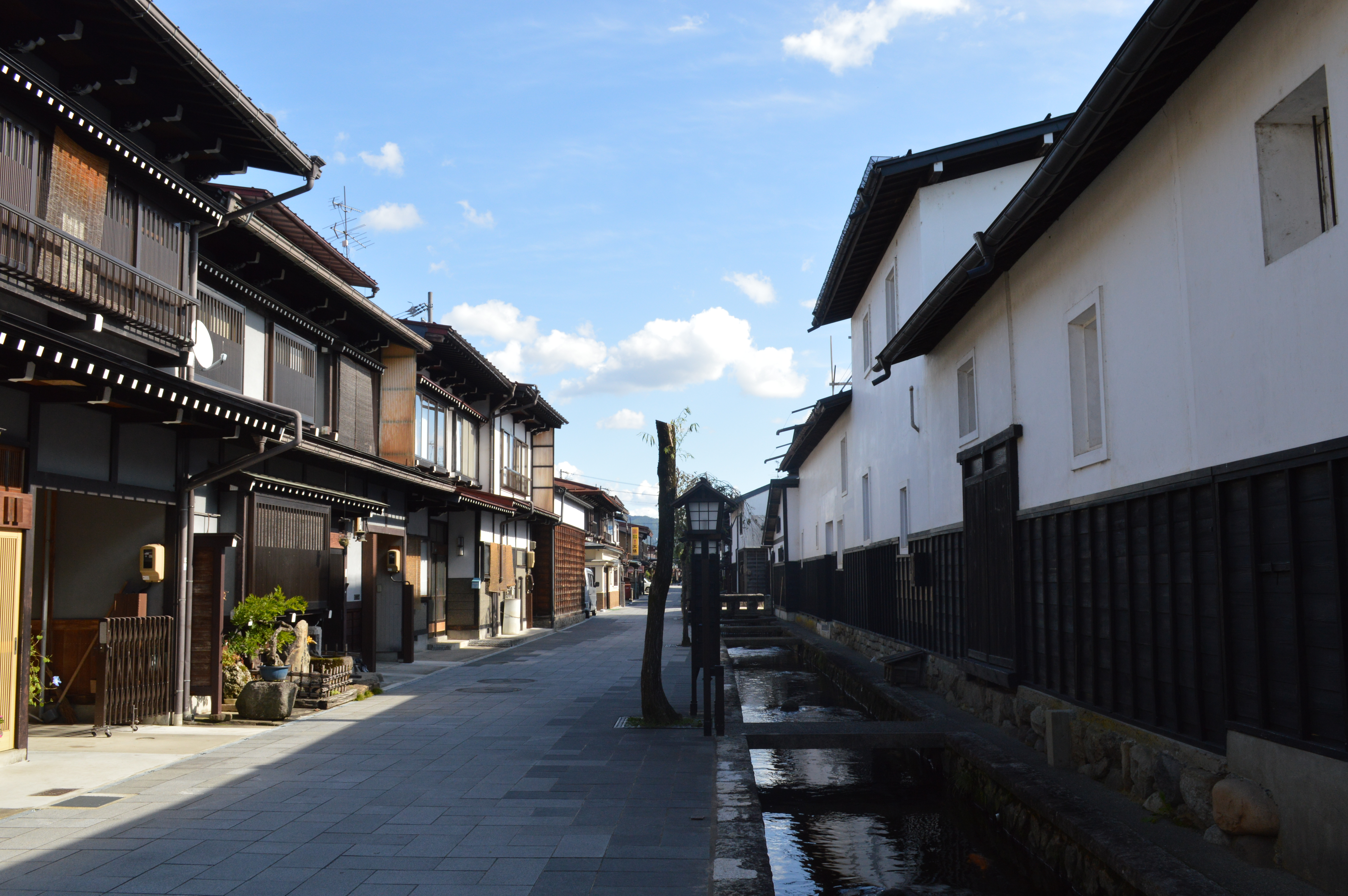 岐阜県飛騨市の瀬戸川と白壁土蔵街。